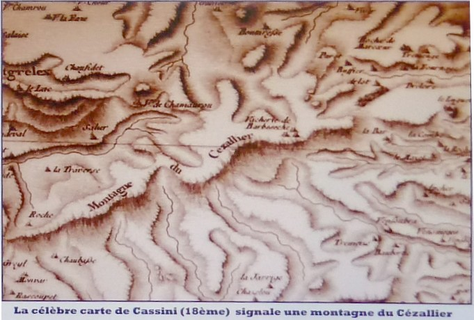 Détaille d'une carte de Cassini (18e siècle) mentionnant une montagne du Cézallier.